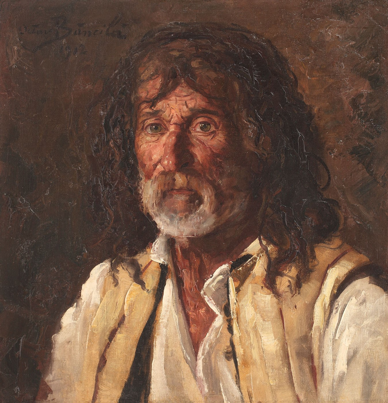 Portretul lui Grigore Chirileanu, ulei pe pânză, 50 × 48 cm, semnat şi datat stânga sus, cu negru, "Octav Băncilă, 1912". Informații documentare: Opera este reprodusă în "Calendarul Minervei", anul XVII, 1915 la pag. 174, sub titlul "Ursarul". Opera a participat la a IV-a expoziție personală Octav Băncilă, Ateneul Român, februarie 1914 și este menționată ca atare în articolul "Mișcarea artistică", N.Pora, "Calendarul Minervei", 1915, pag. 178. Portretul îl reprezintă pe tatăl lui Gheorghe T. Kirileanu, cărturar, folclorist, bibliotecar al Palatului Regal și membru de onoare al Academiei Române. Grigore Chirileanu a fost mai întîi lucrător la pădure, iar apoi pădurar și destoinic vînător de urși.[1]